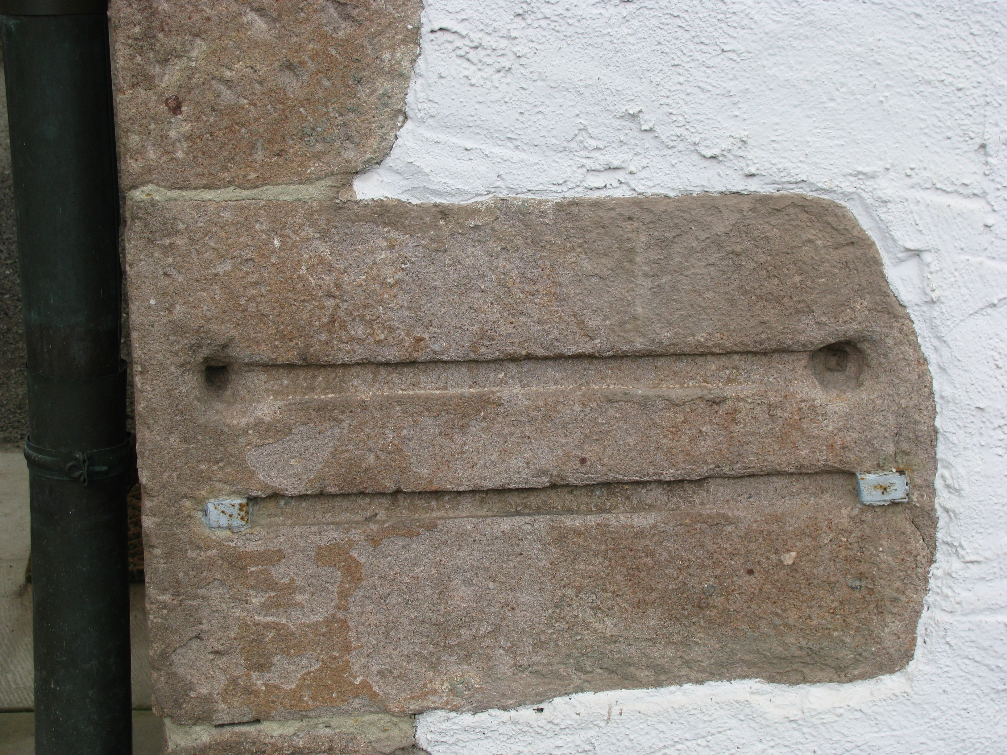 Kurpfälzische und brabantische Elle an der Hirsauer Kirche